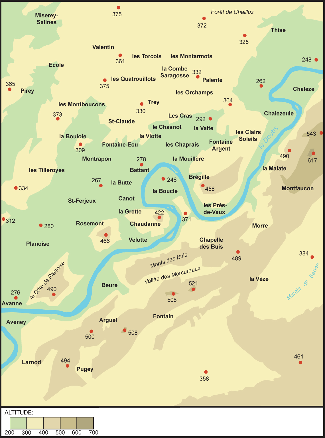 croquis présentant des information topographique et toponymiques sur le site de Besançon